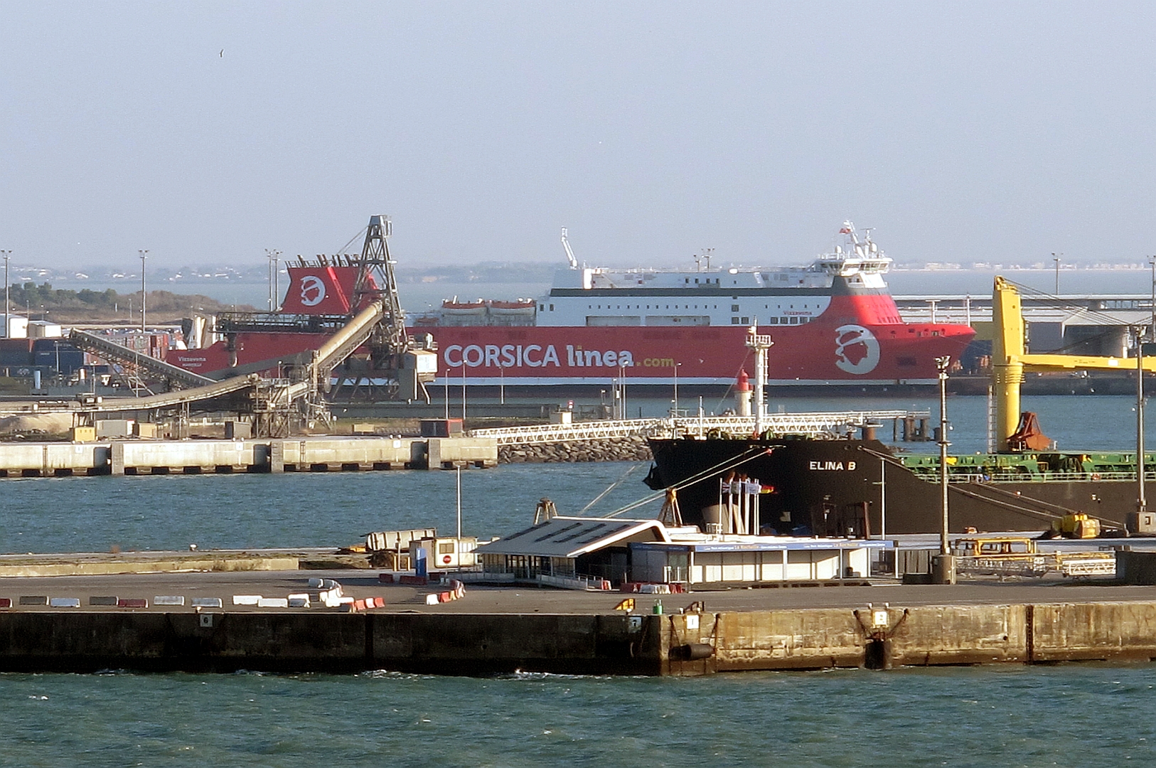 Le navire mixte Vizzavona de la Corsica Linea au port de la Rochelle-Pallice le 19 novembre 2018.